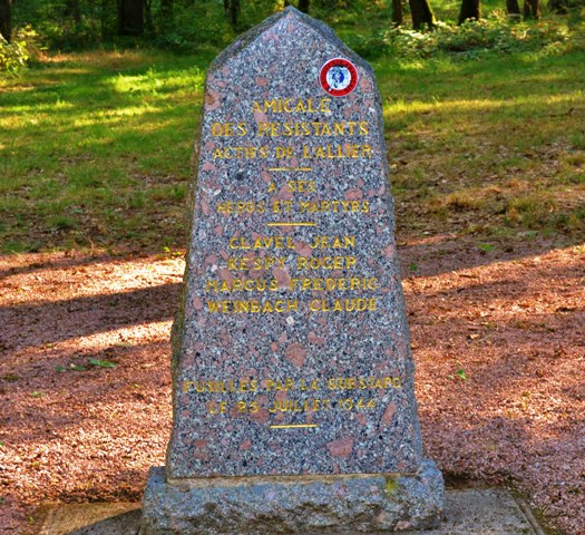 Image Site Saint Remy en Rollat